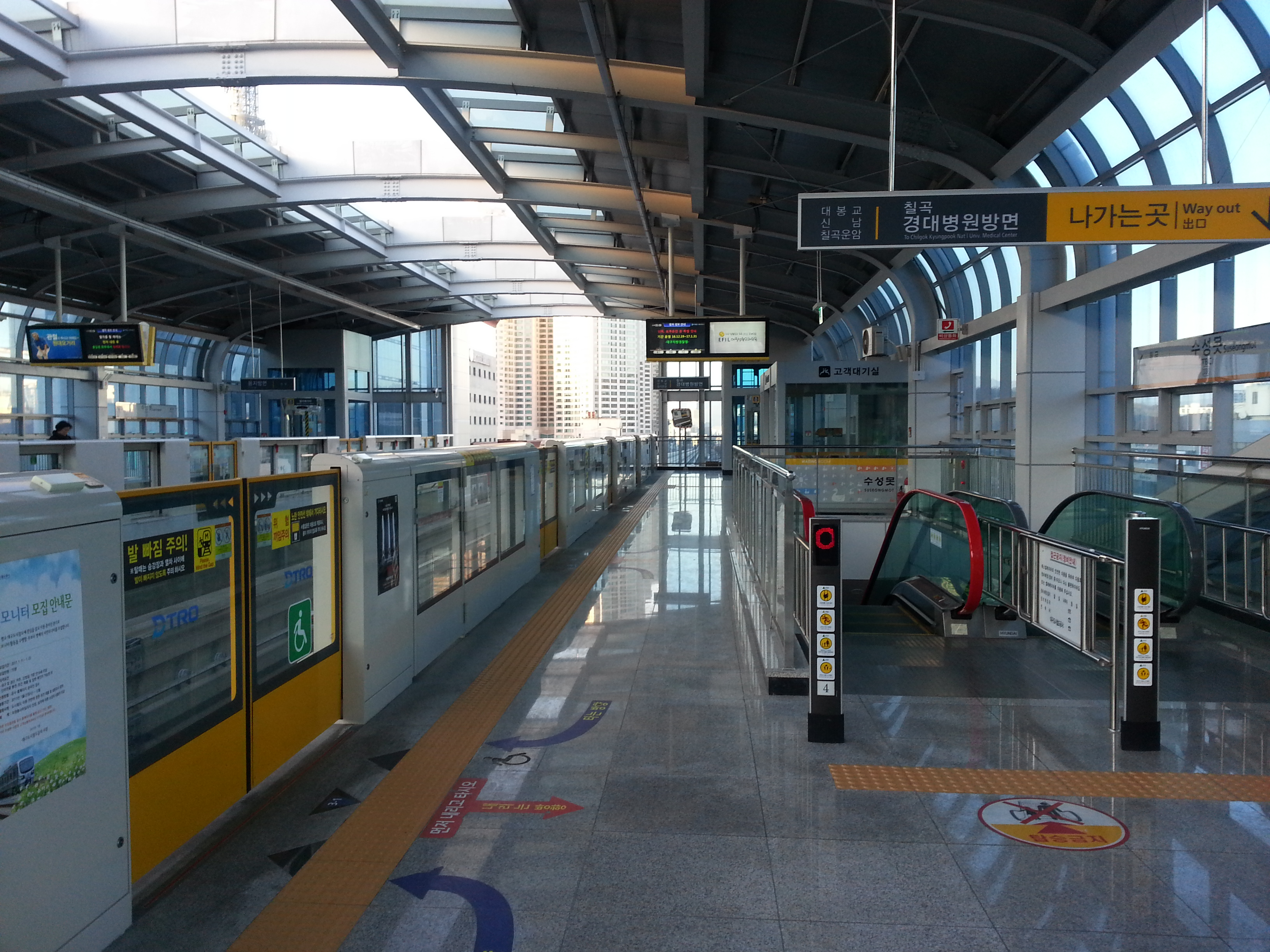 대구 도시철도 3호선 수성못역 칠곡경대병원 방면 승강장